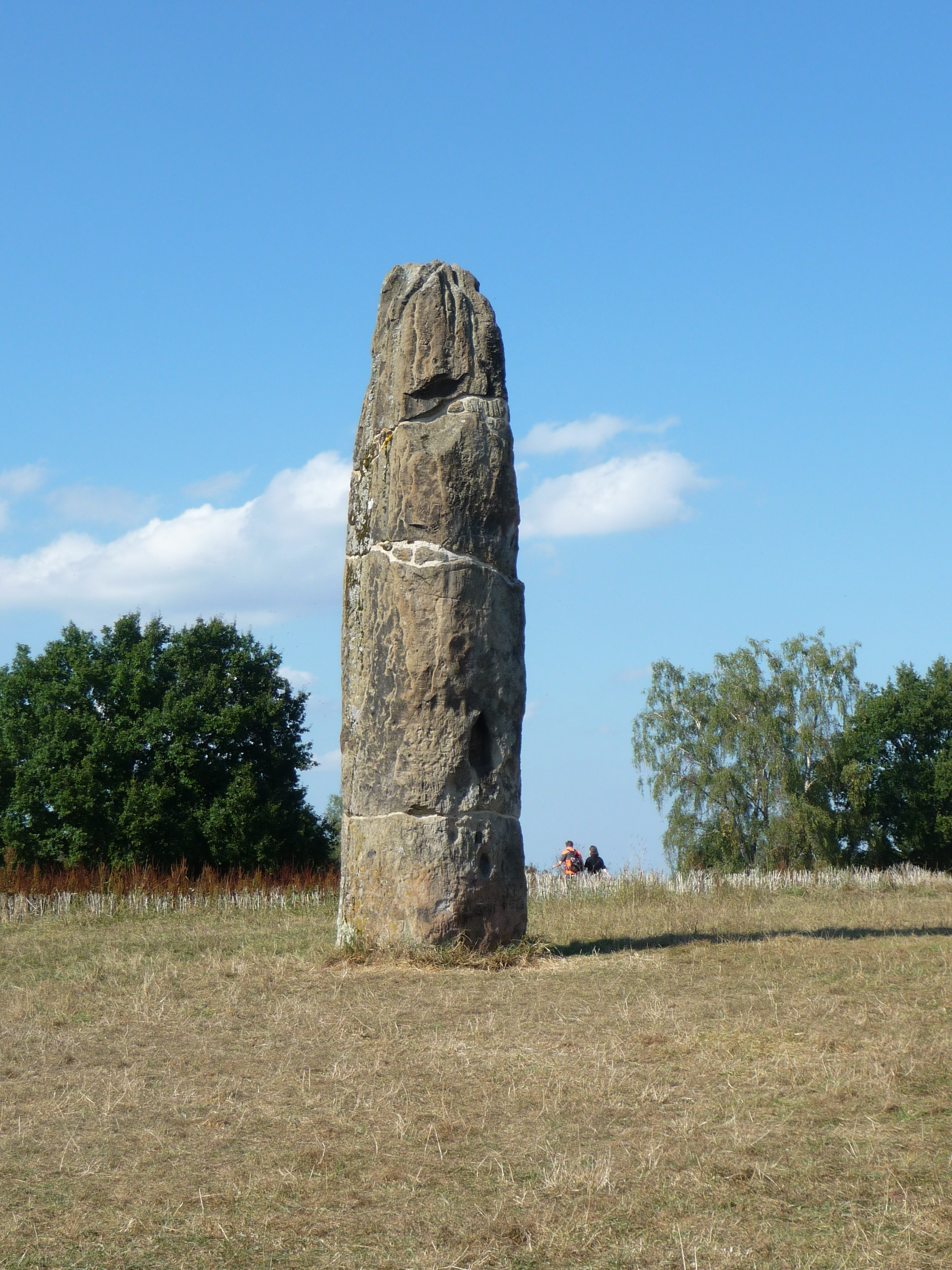 Der etwa 4000 Jahre alte Gollenstein bei Blieskastel gilt mit seinen 6,58 Metern Höhe als der größte Menhir Mitteleuropas.